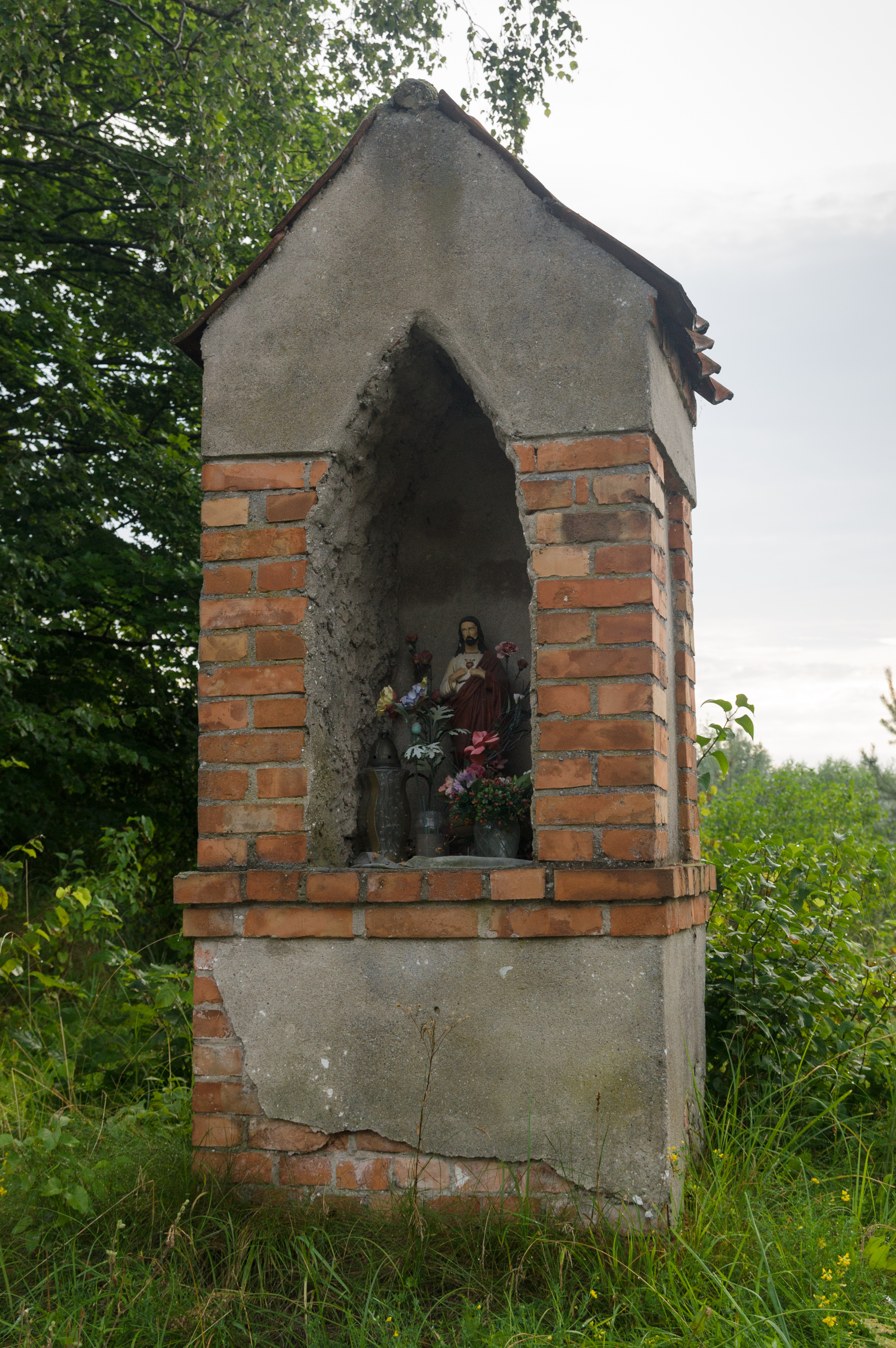 Przydrożna kapliczka w okolicach wsi Kierz, pow. lidzbarski.